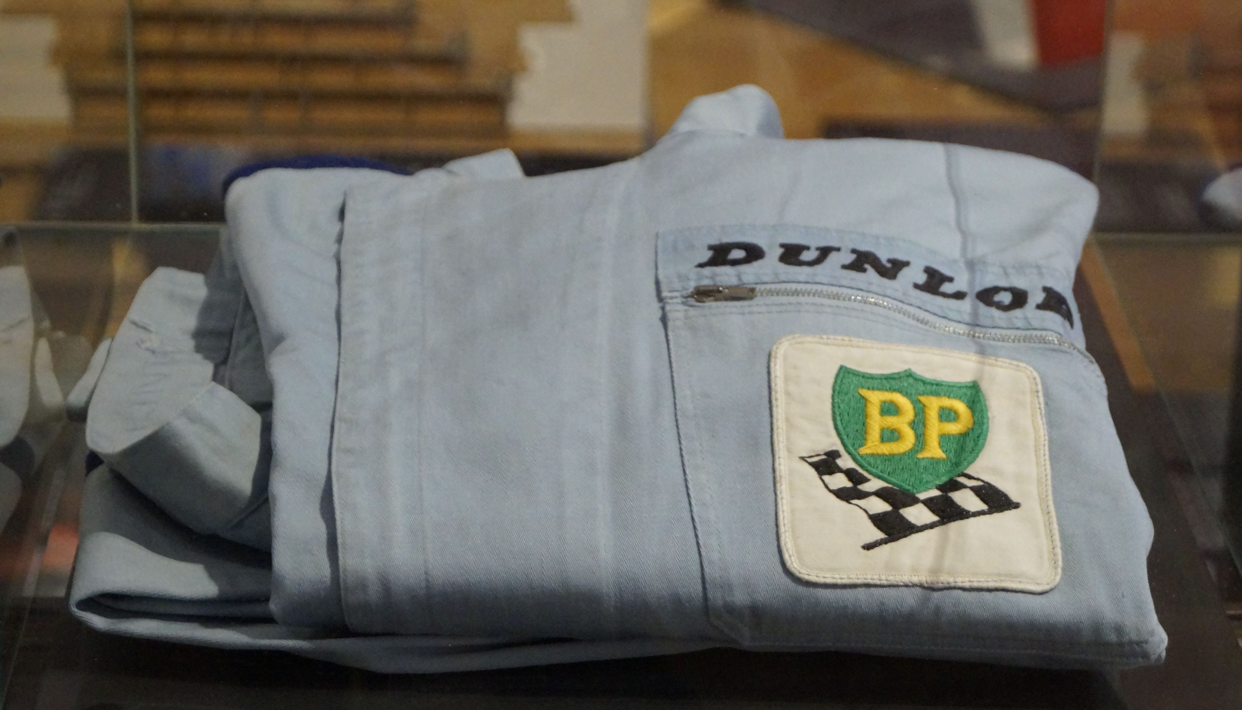 Die historische Schausammlung und Dauerausstellung „360GRAZ | Die Stadt von allen Zeiten“ zeigt die politische, wirtschaftliche und soziale Geschichte der Stadt Graz in einer offenen Form. In diesem thematisch und chronologisch geordneten Schaudepot wird die Geschichte von Graz dargestellt. Der Overall ist eine Leihgabe aus der Sammlung von Erich Walitsch